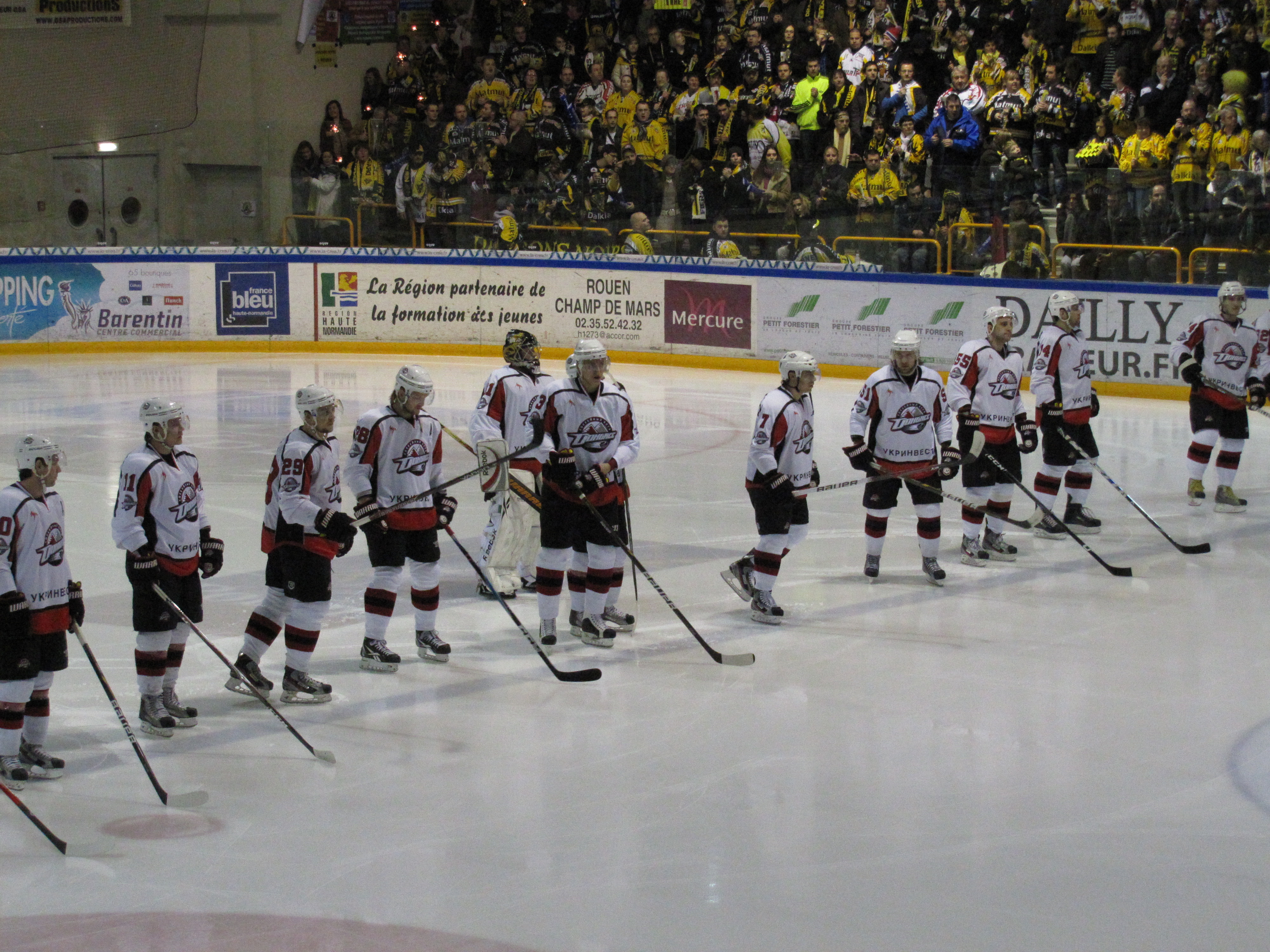 Coupe Continentale de hockey 2012 à Rouen